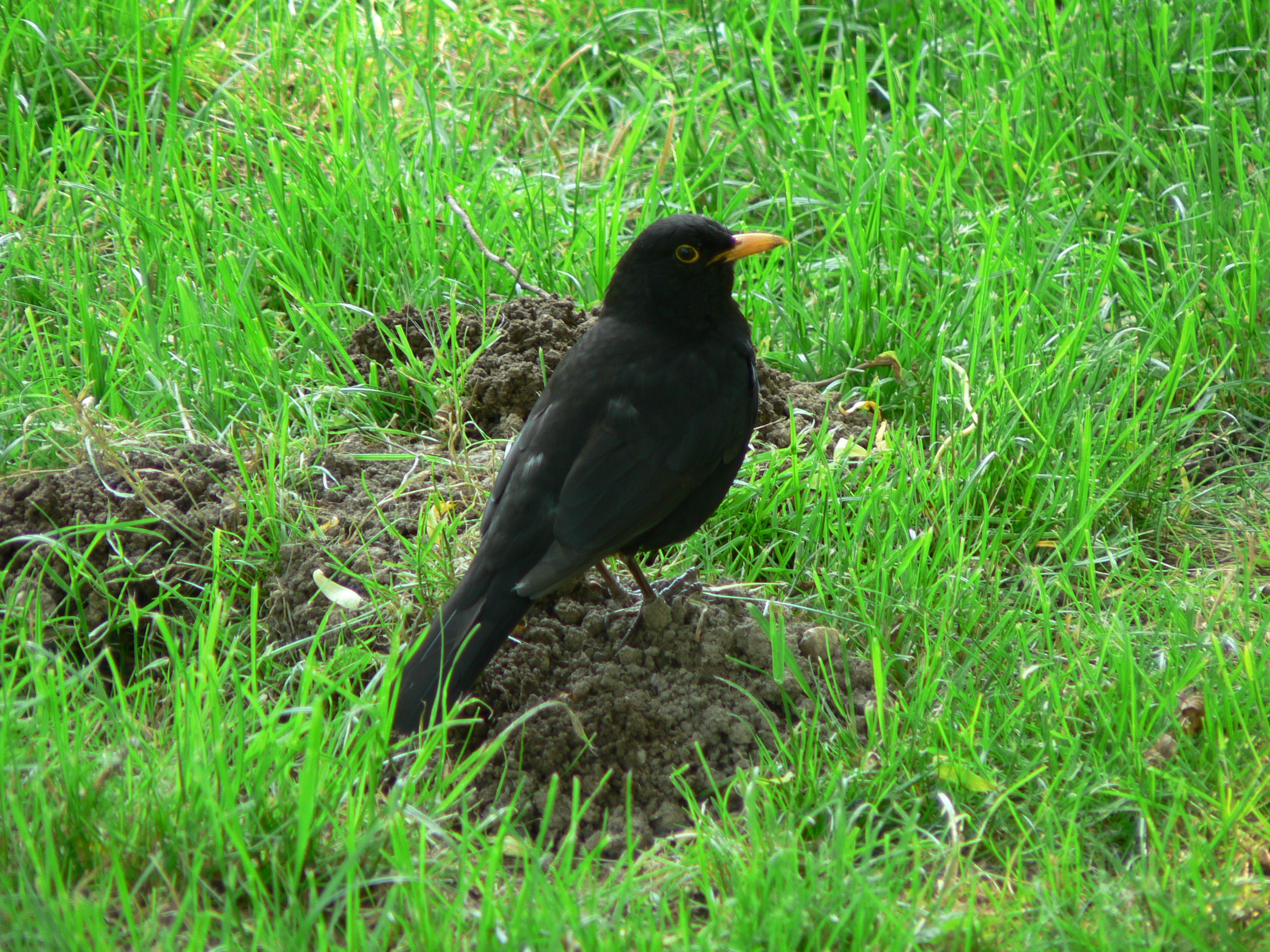 Beschreibung: Amsel (Turdus merula) Ort: Bad Soden, Hessen, Germany Fotograf: Olaf Mertens, 29.05.2005